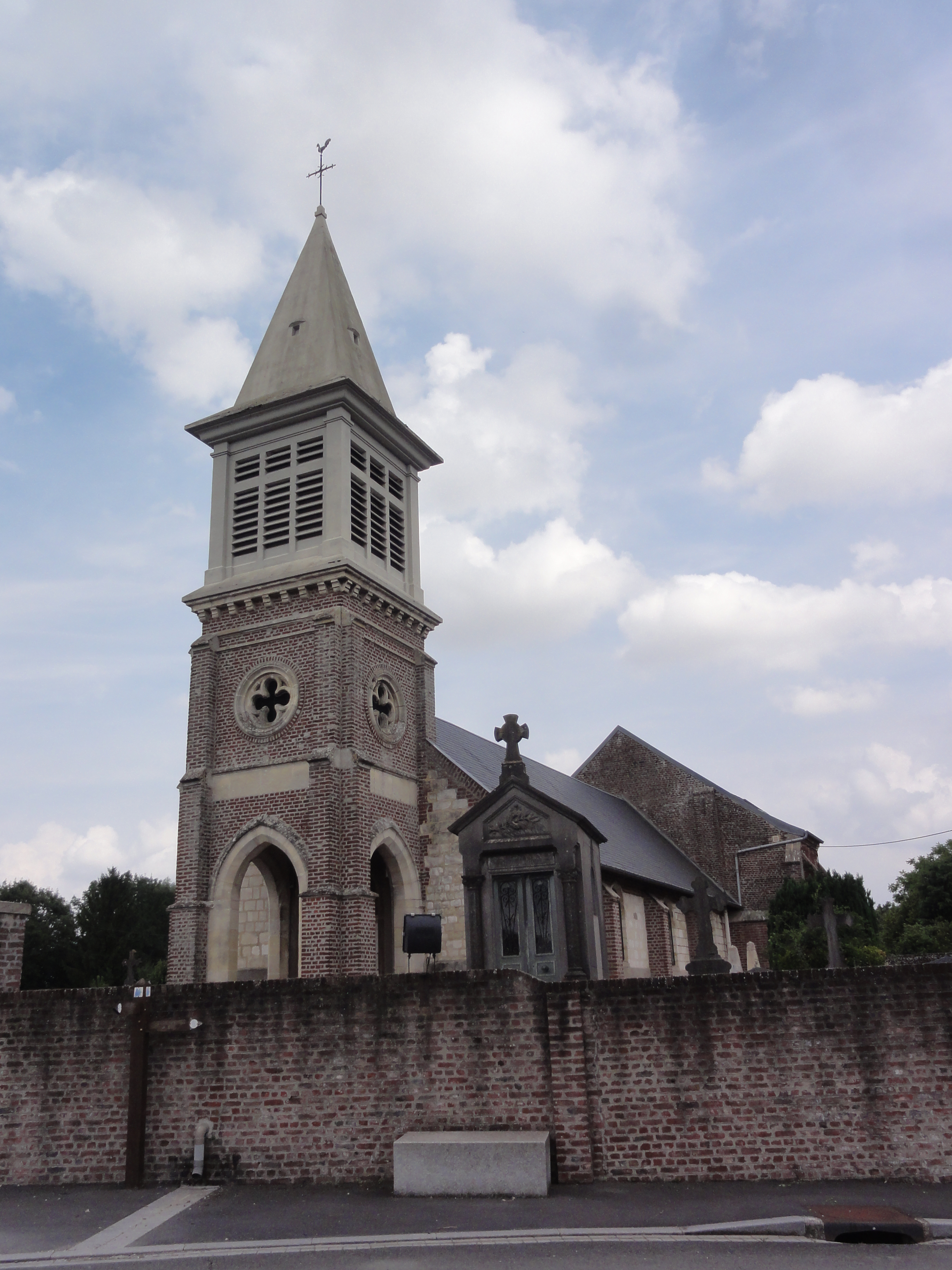 Lesdins (Aisne) église